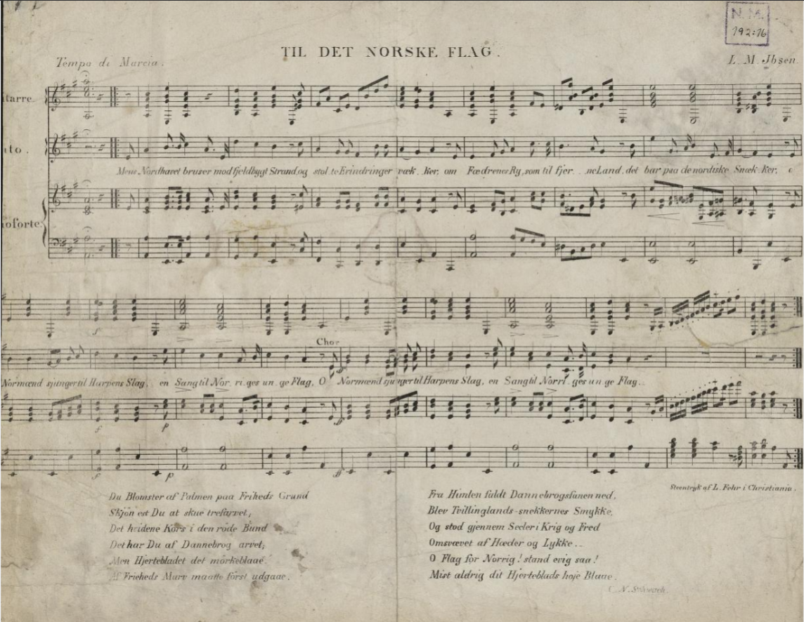 Mens Nordhavet bruser